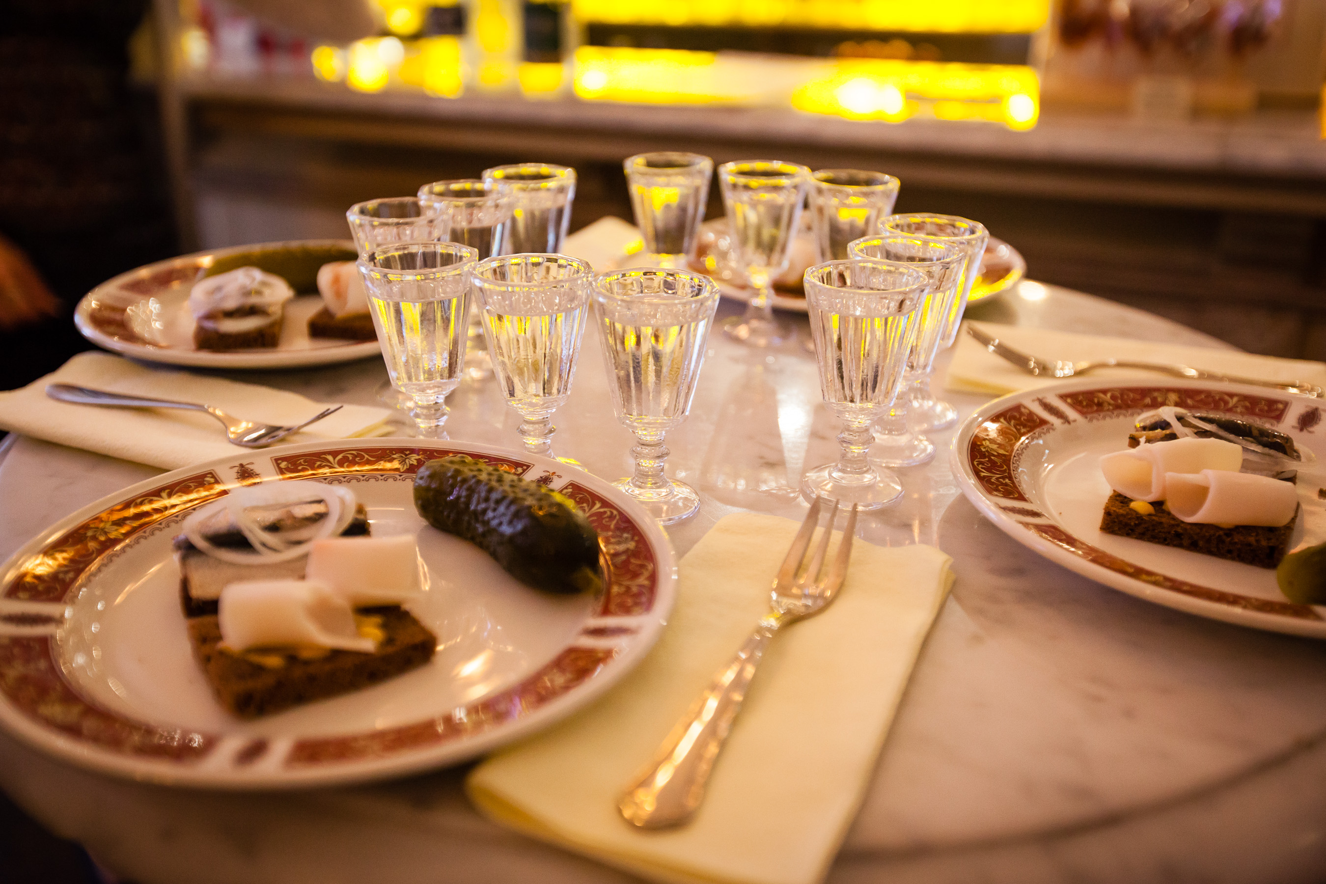 St. Petersburg